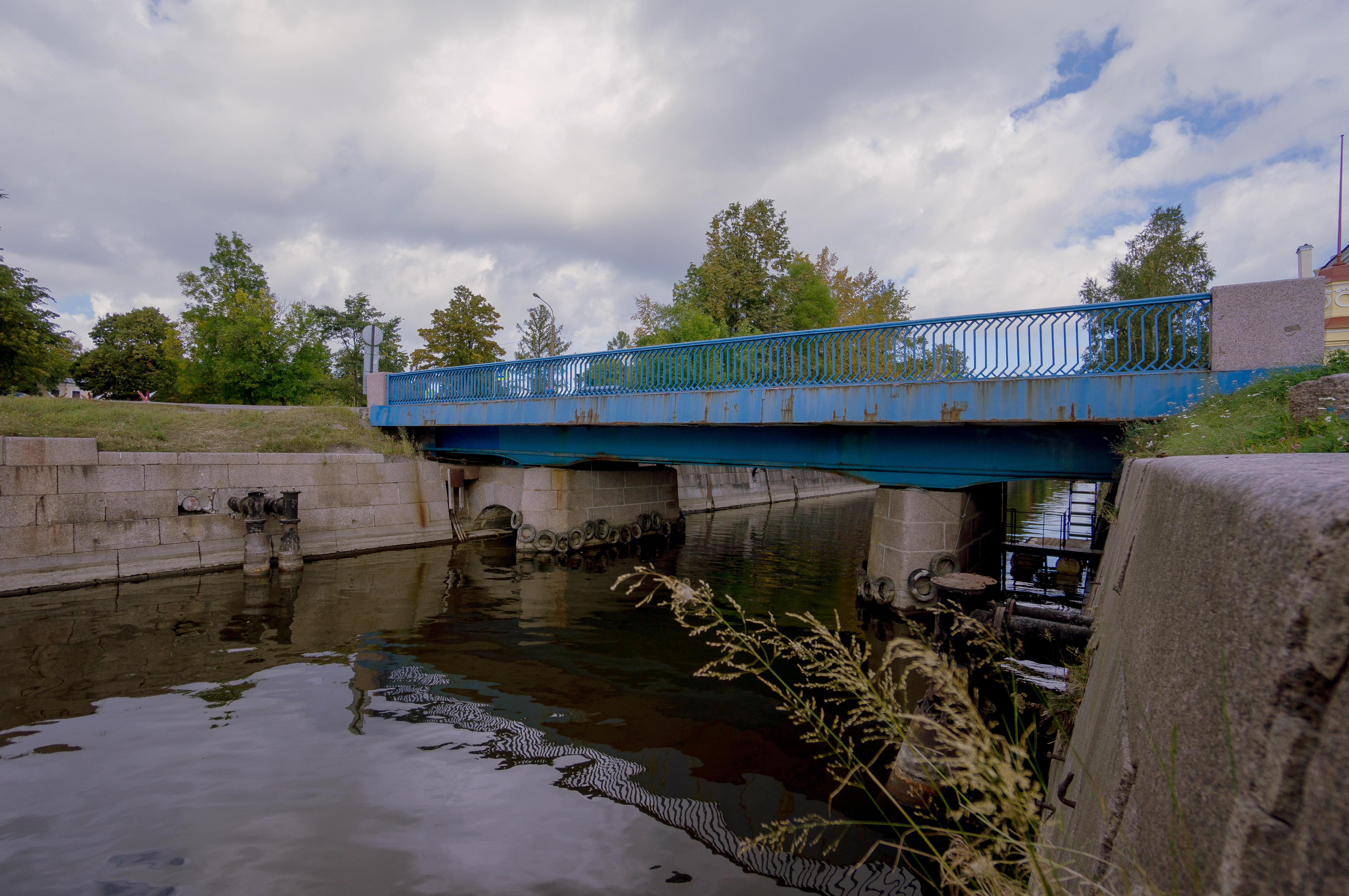 Синий мост через Обводный канал: Кронштадт, Кронштадтский район, Санкт-Петербург